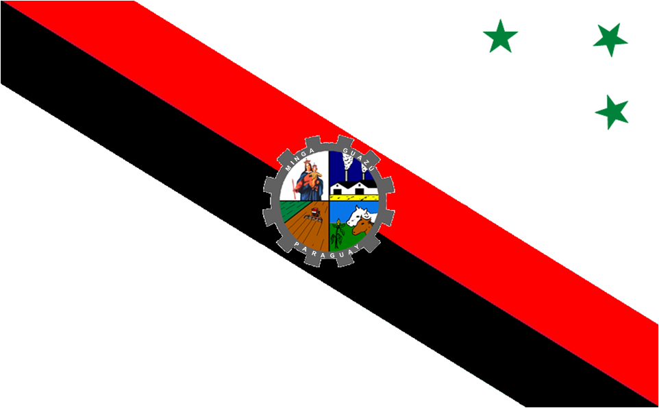 Flag of Minga Guazú